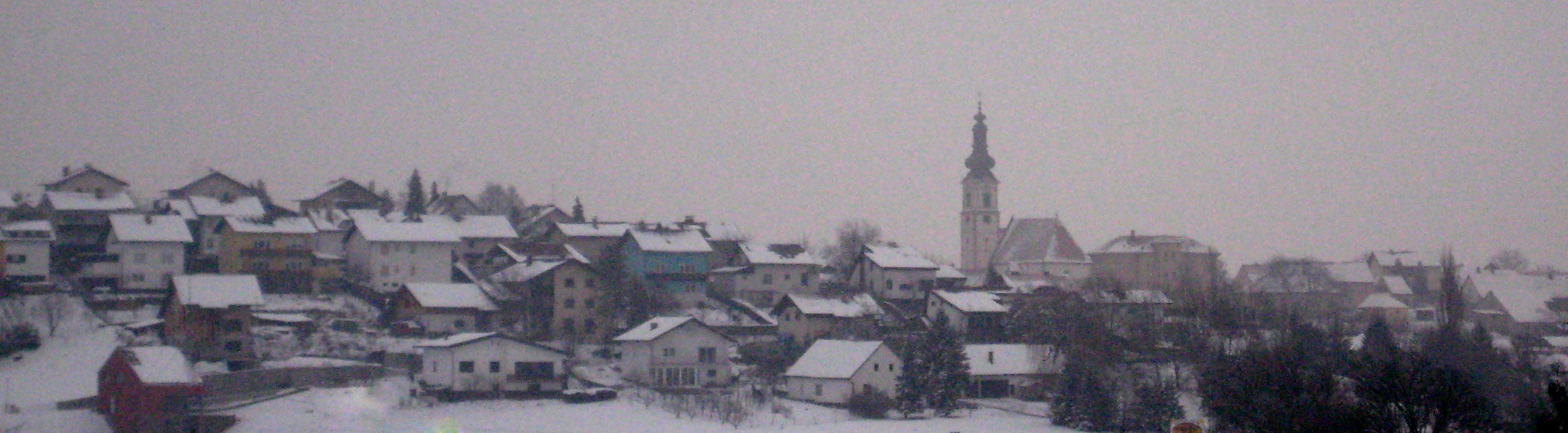 Lenart, town in Slovenske gorice, Slovenia